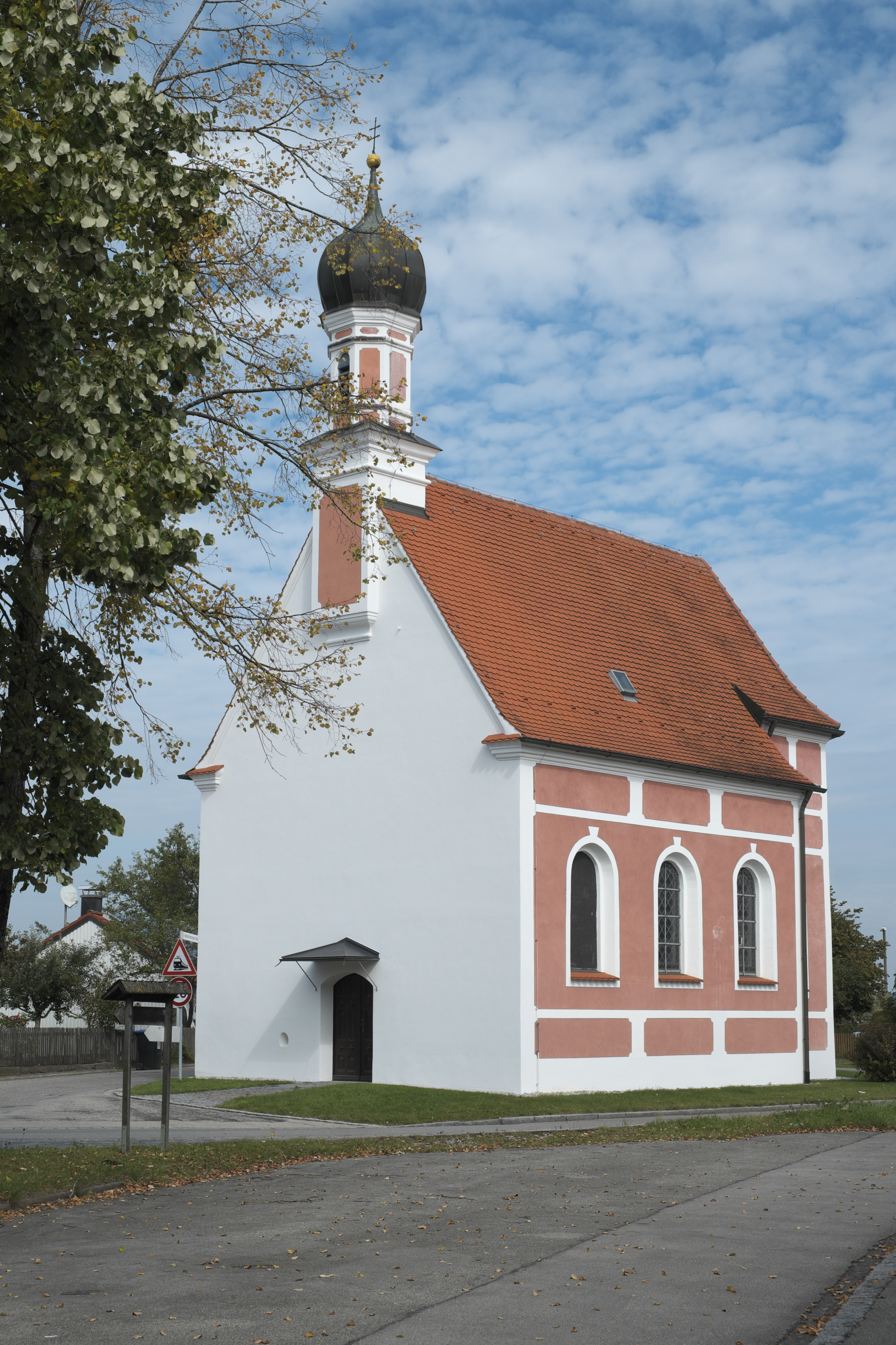 Katholische Kapelle St. Antonius, St.-Anton-Weg 1, in Denklingen im Landkreis Landsberg am Lech (Bayern/Deutschland)